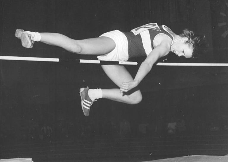 Rita Schmidt Zentralbild Kutscher 16.2.70 Berlin: DDR-Hallen-Leichtathletikmeisterschaften (am 15.2.70 in der Dynamo-Sporthalle) . Den Hochsprung der Frauen gewann die Leipzigerin Rita Schmidt (SC DHfK) mit 1,83 m im ersten Versuch.